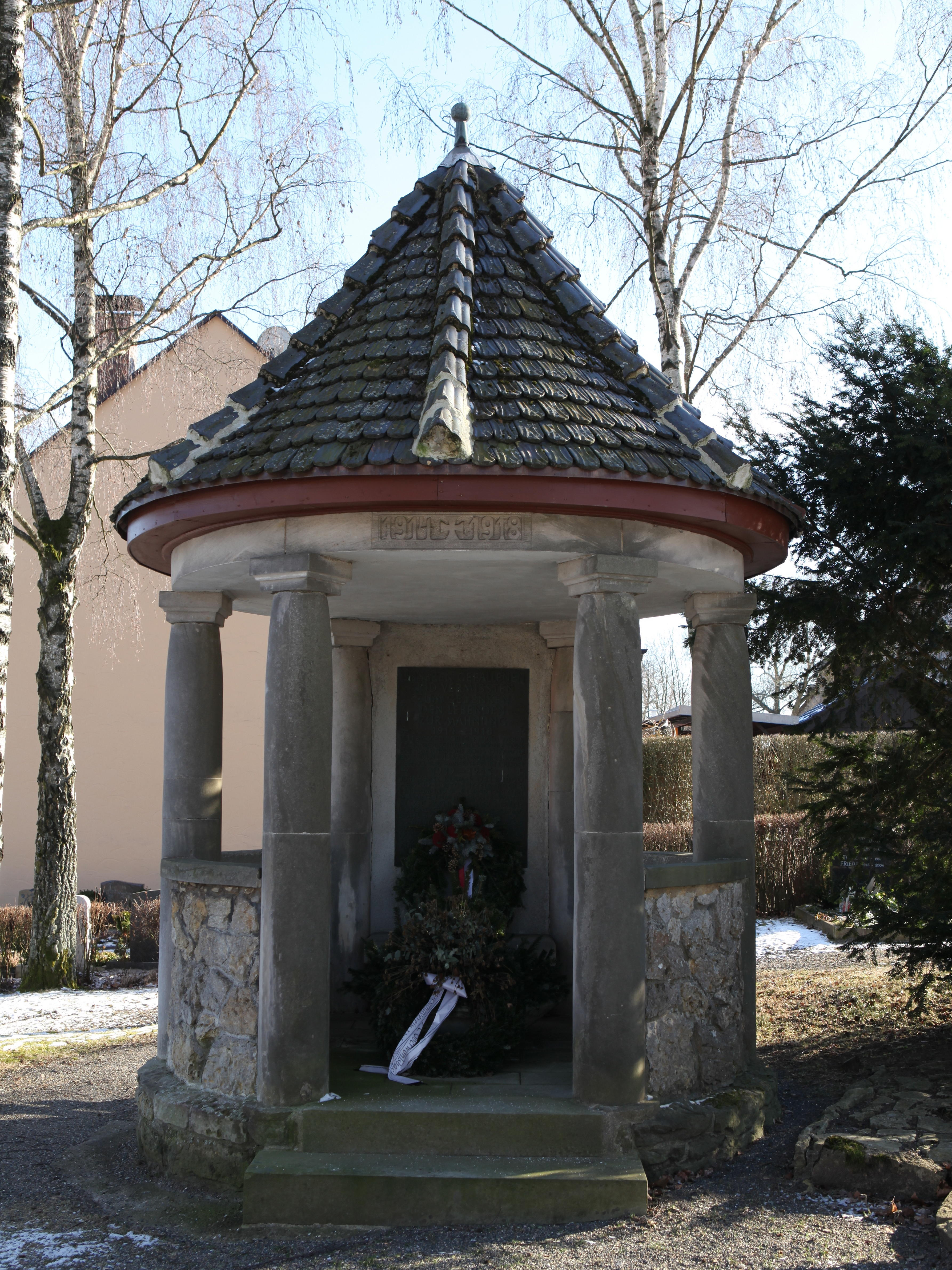 Kriegerdenkmal, Fornbacher Weg 1, Oberwohlsbach, OT von Rödental